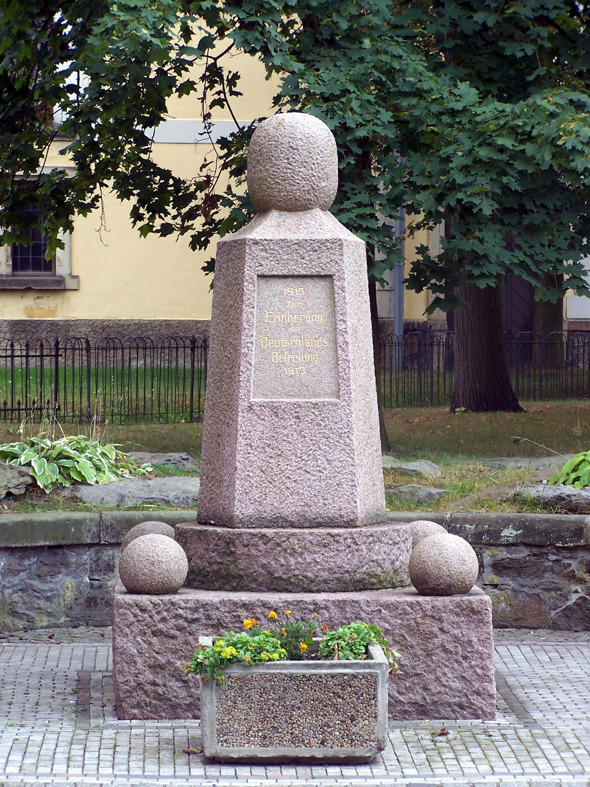 Inschrift: "1913 Zur Erinnerung an Deutschlands Befreiung 1813"